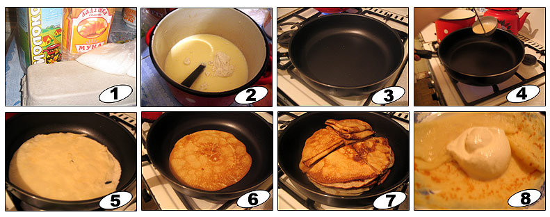 Блины